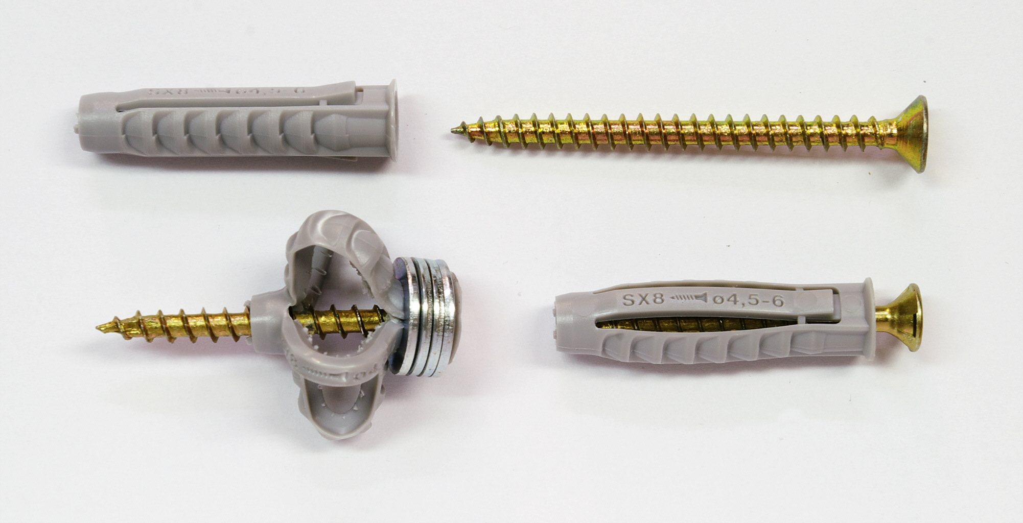 Mehrzweckdübel zur Verwendung in Hohlräumen und festen Baustoffen. Die Beilagscheiben beim Dübel unten links simulieren für das Foto eine Gipskartonplatte.